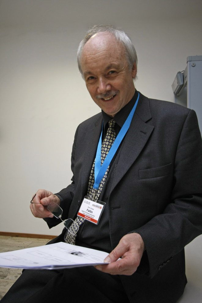 Günter Faltin (* 25. November 1944 in Bamberg) ist ein deutscher Hochschullehrer und Unternehmensgründer.